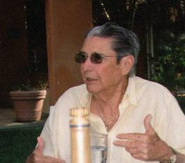 Fernando Espejo Méndez. Conferencista en su disertación sobre el Cráter de Chicxulub en Chicxulub, Yucatán, México